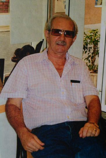 Retrato de Tomás Falcón Reyes